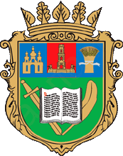 Герб Корецького району